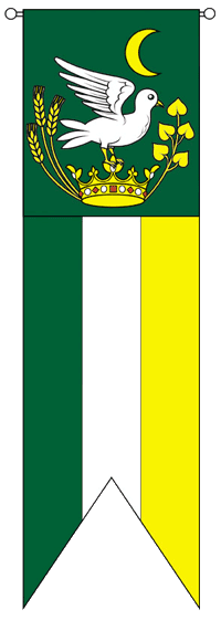 Koruhva mesta Krásno nad Kysucou